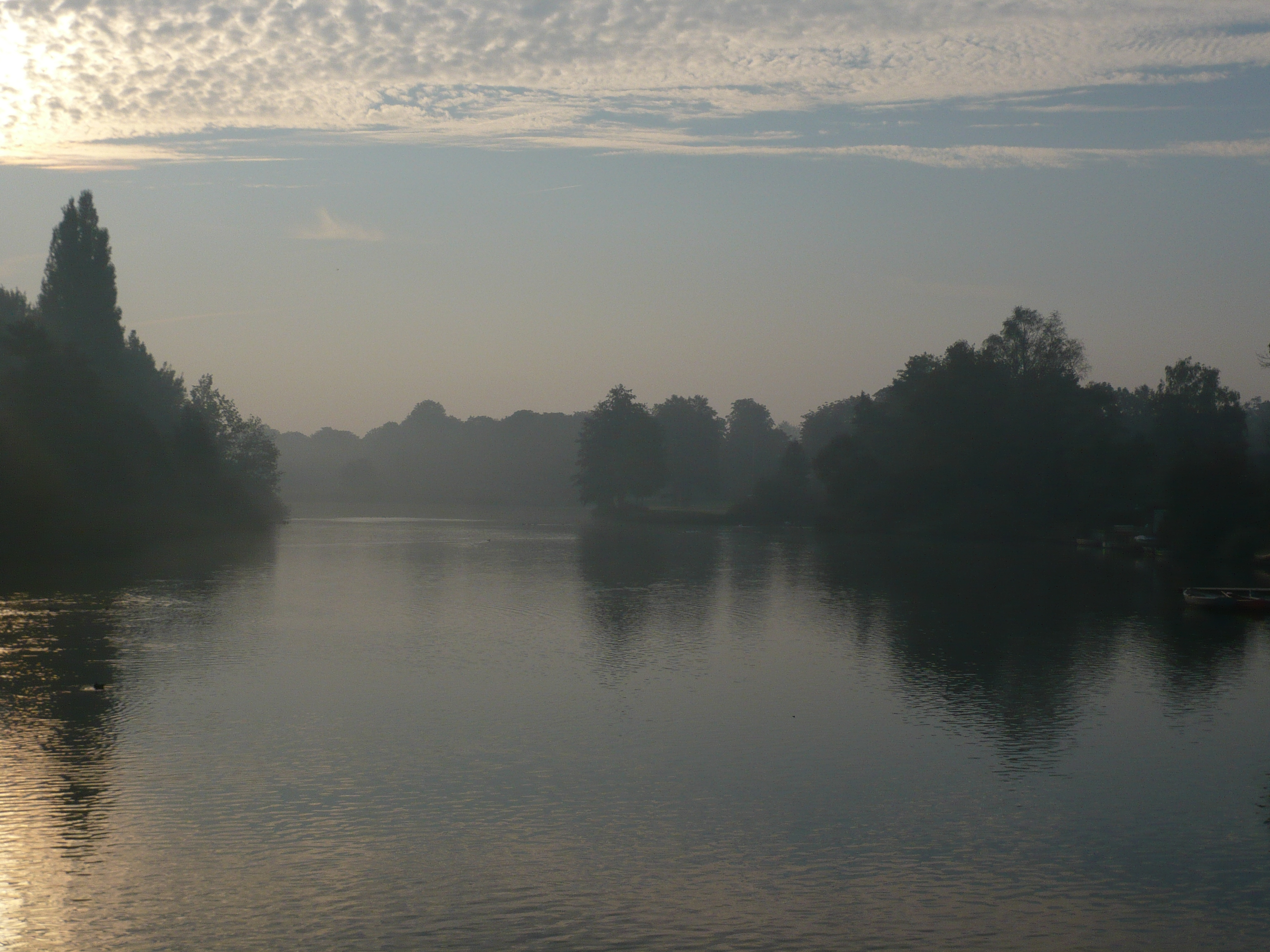 Aller im NSG „Obere Allerniederung bei Celle“, Niedersachsen